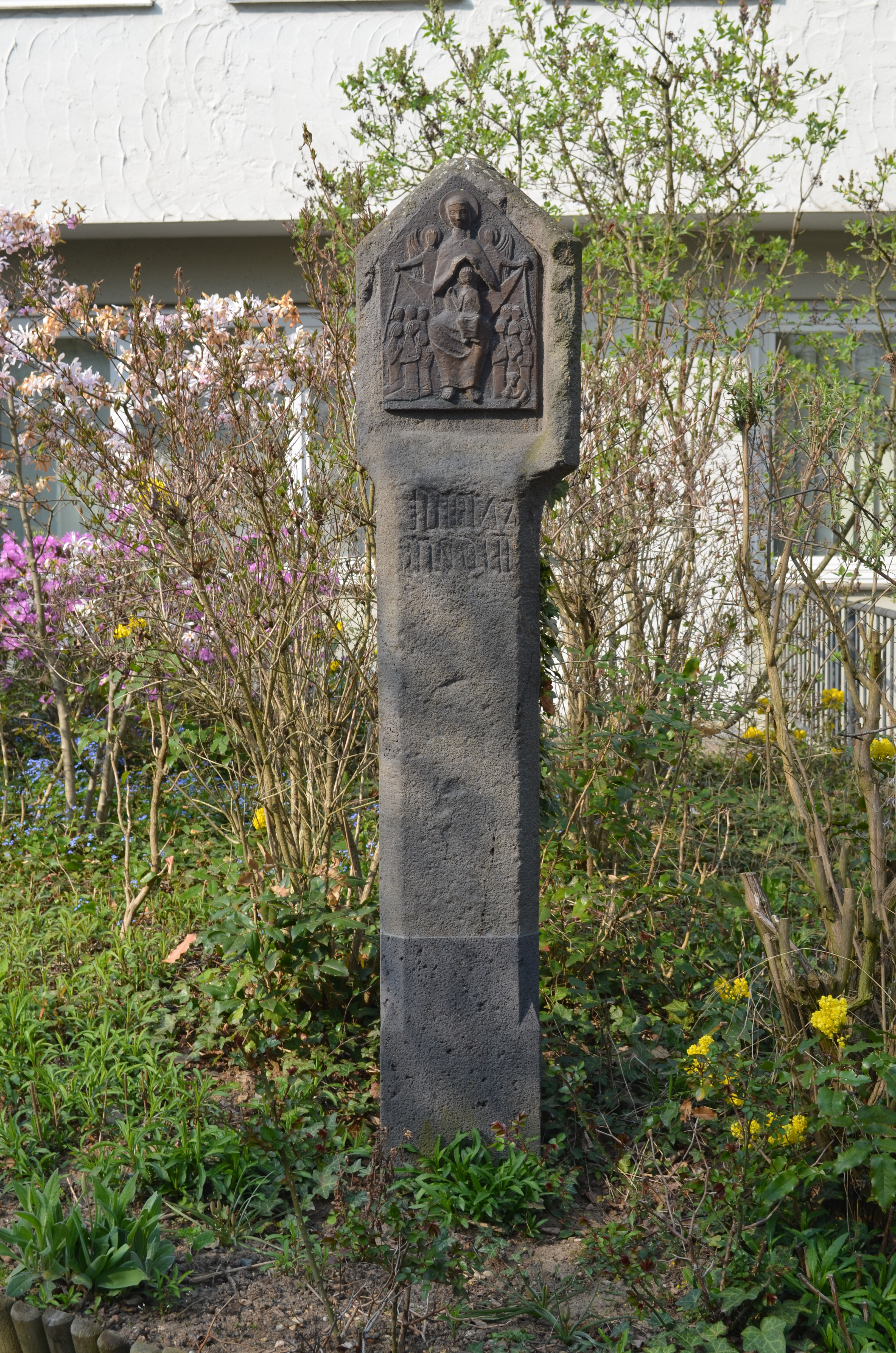 Ginheim, Heiligenstock